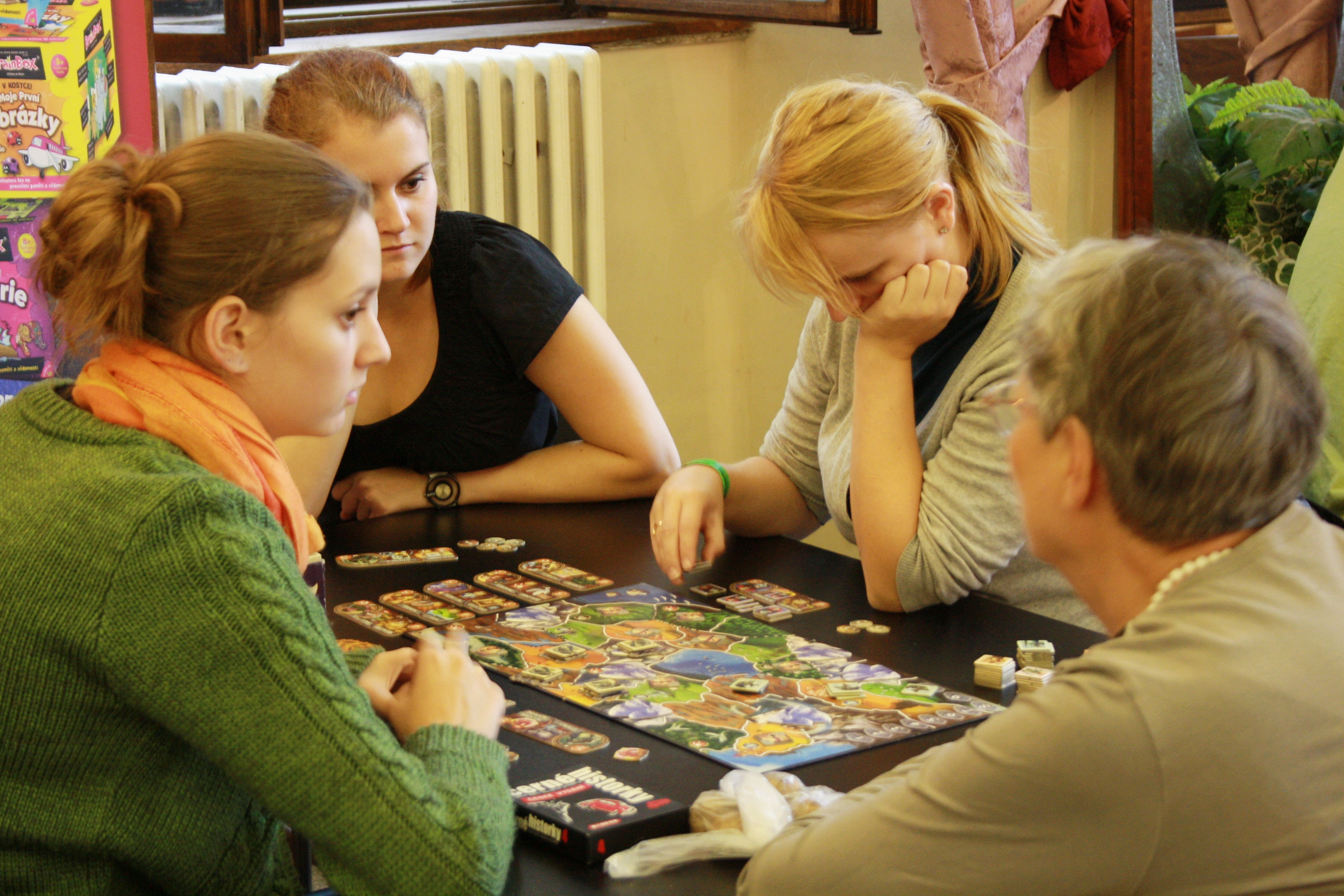 Deskohraní 2012 - Small World